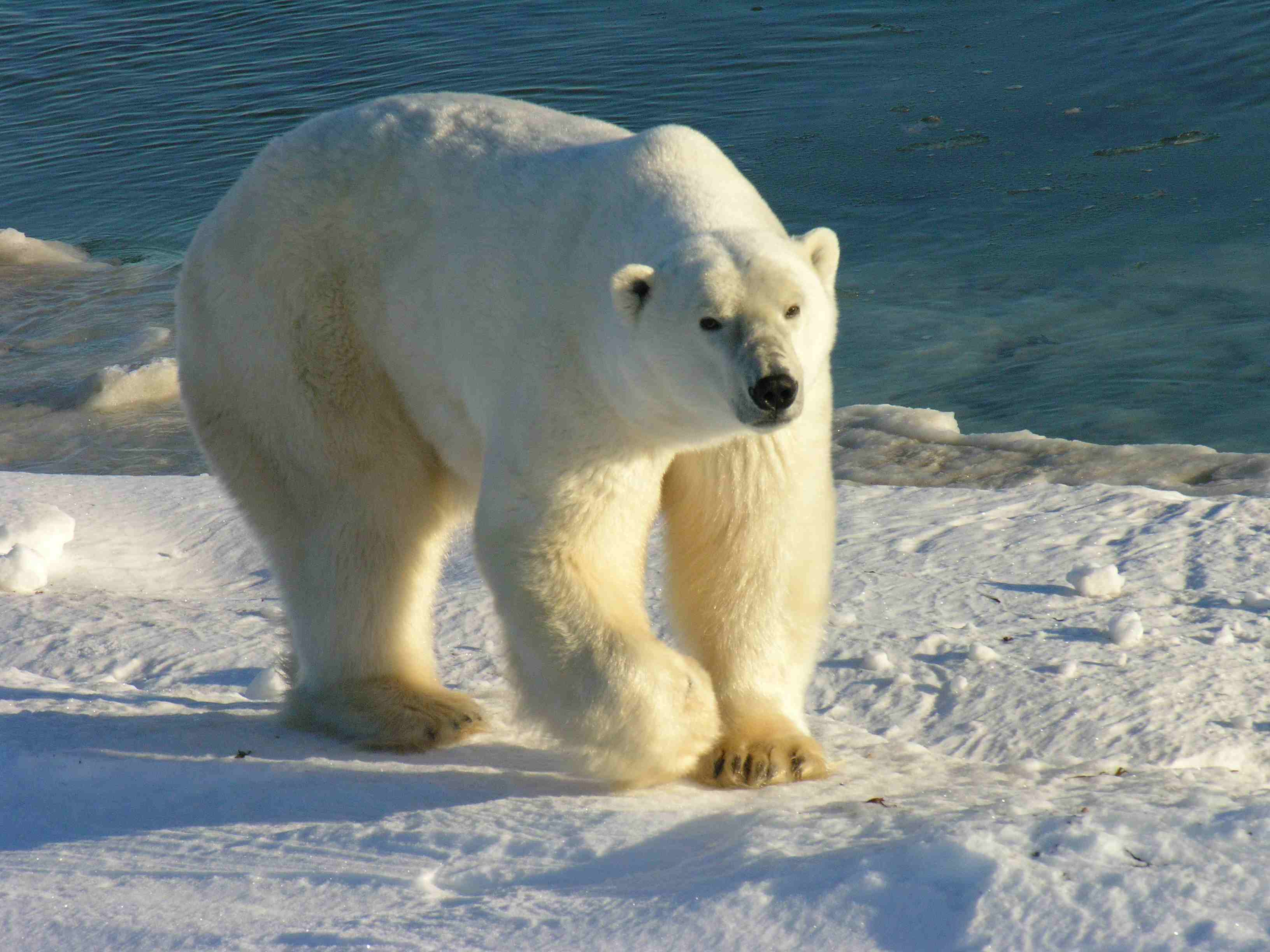 Polar bear (Wapusk National Park, Manitoba, Canada)